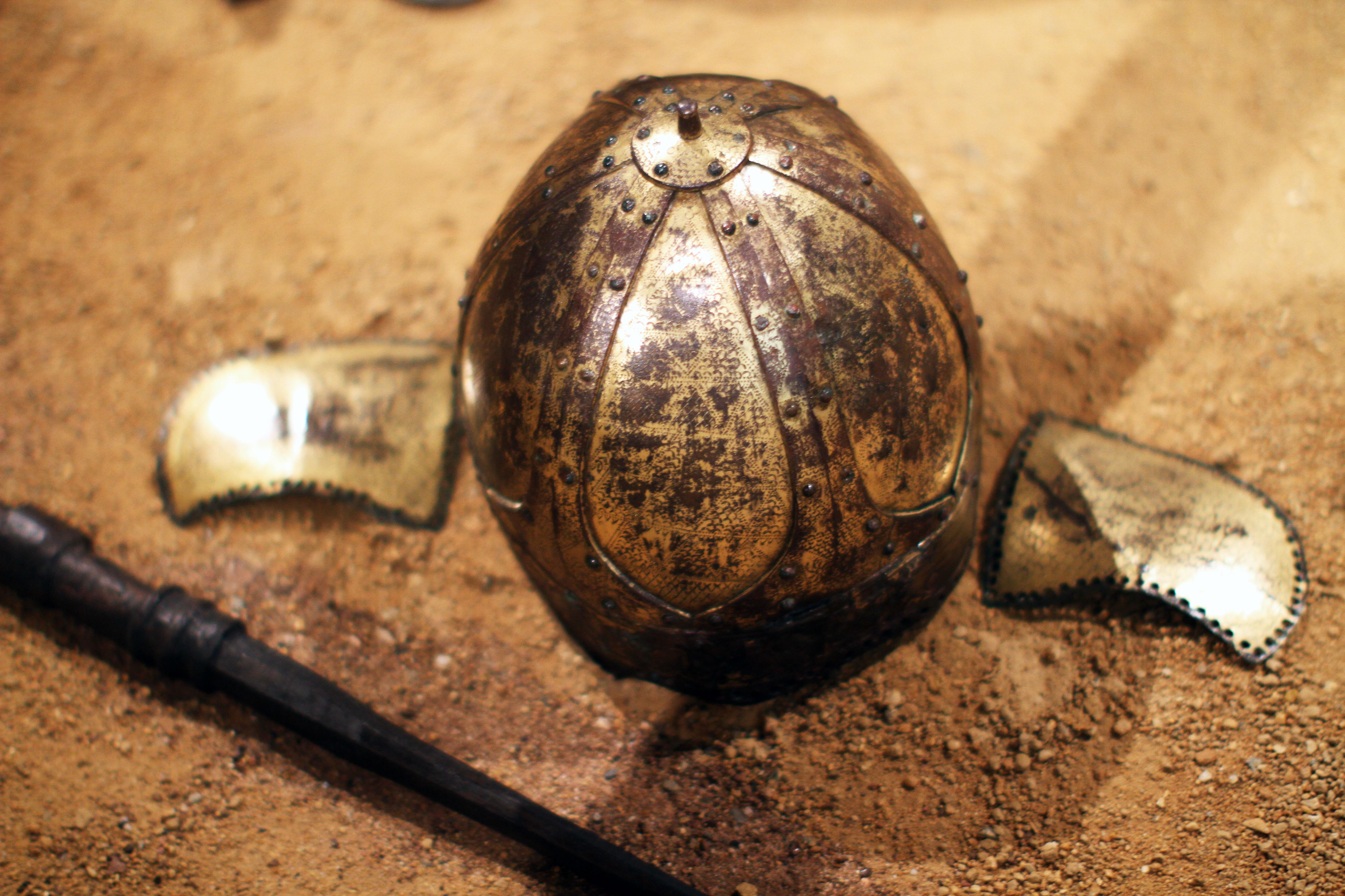 Das Grab des „Herrn von Morken“ war einer der bedeutenden Funde, den die 1955/56 in Morken durchgeführten Grabungen des Rheinischen Landes Museums Bonn zu Tage förderten. Unter den Fundstellen en eines aufgedeckten fränkischen Gräberfeld es befand sich ein Fürstengrab des 6. Jahrhunderts. Es barg der Helm eines Adeligen, der wohl die markanteste und am besten erhaltene Grabbeigabe sein dürfte. Der geborgene Helm ist aus Eisen und vergoldetem Bronzeblech gefertigt. Er hat eine Höhe von 18 cm, sein größter Durchmesser erreicht 22,5 cm.